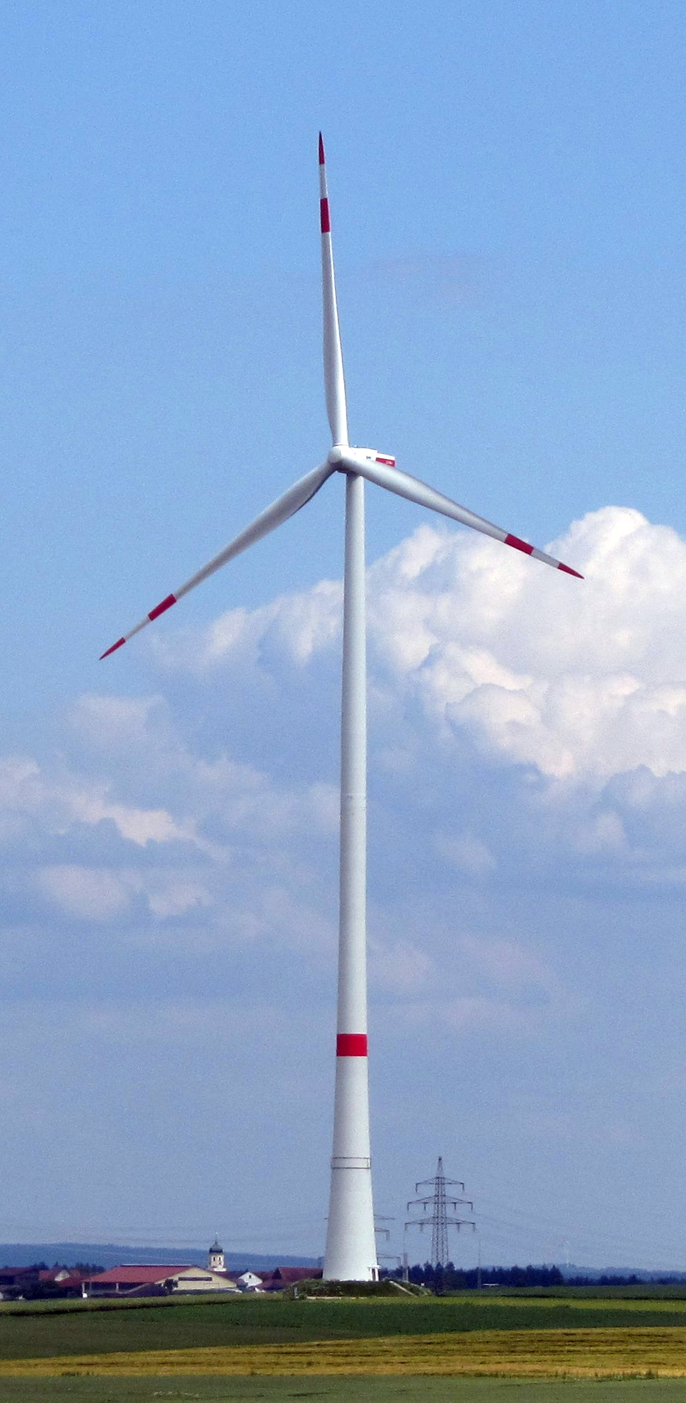 Windpark Berching, REpower 3.2M114